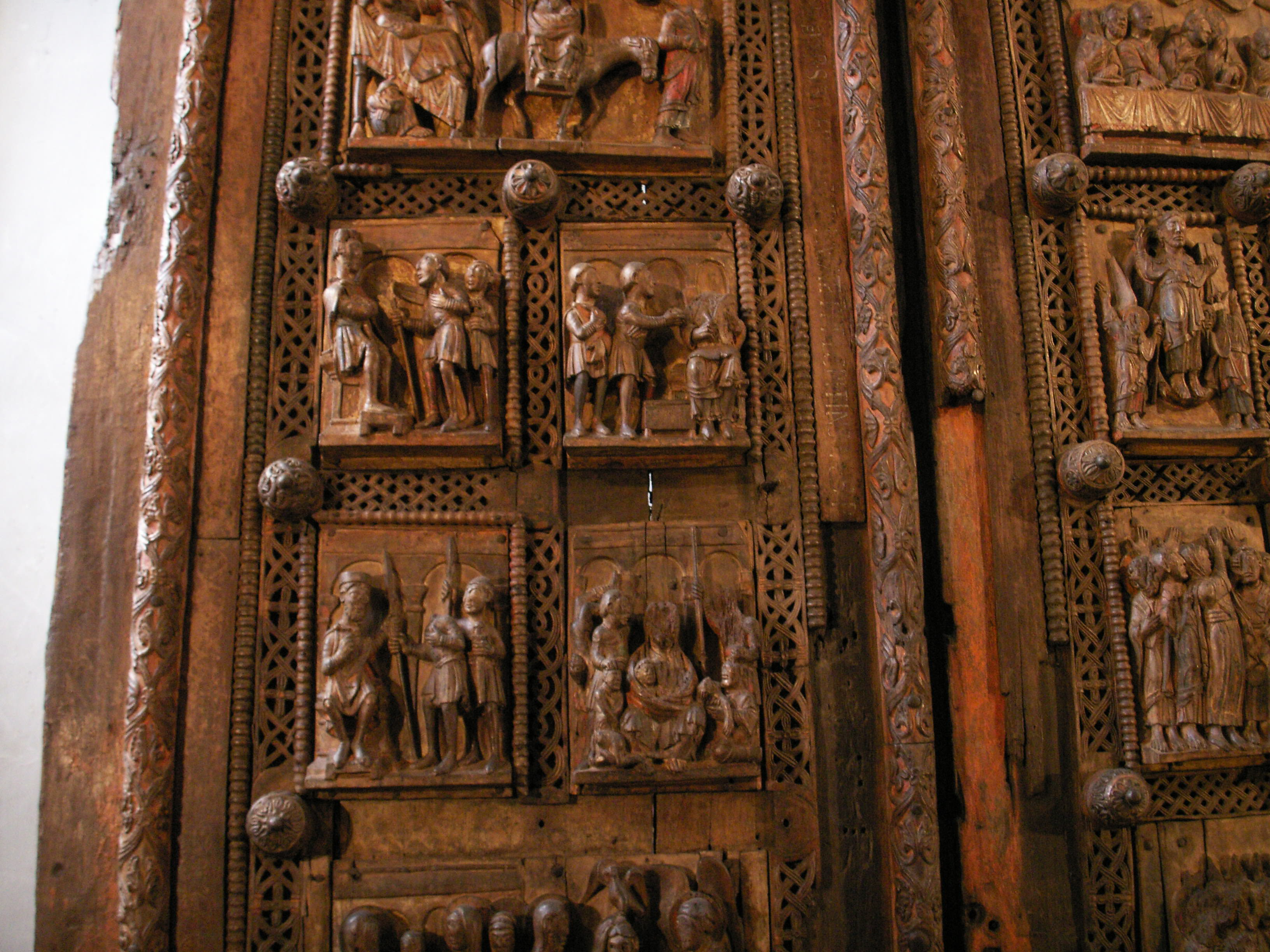 St. Maria im Kapitol, Köln, Romanische Holztüre